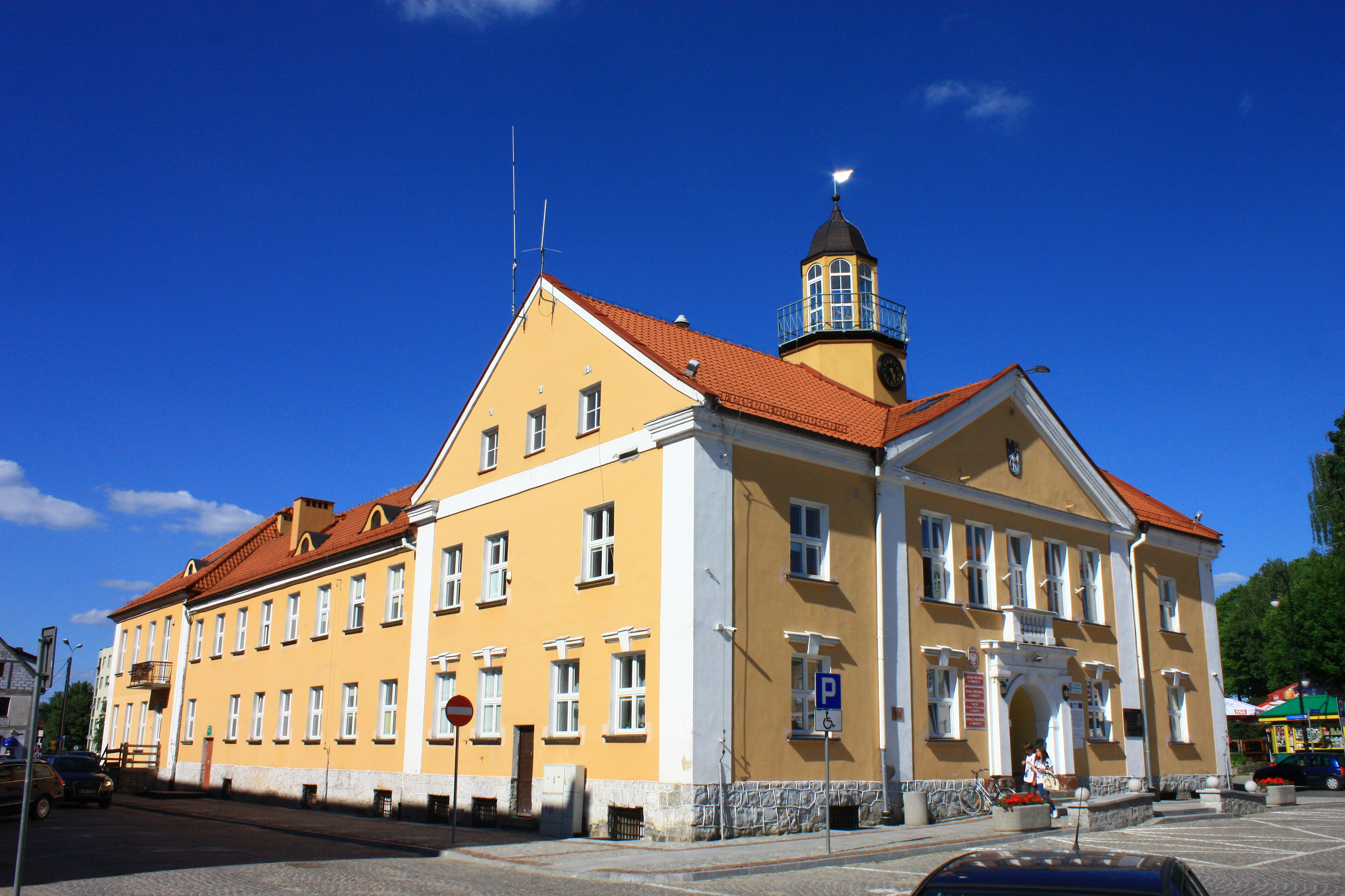 Nidzica, ratusz, po 1828, 1923-1924